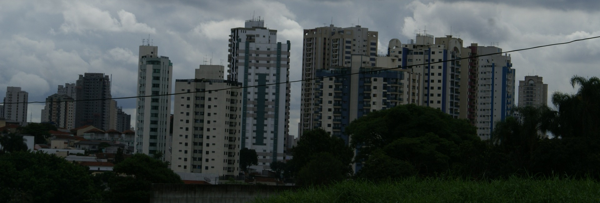 Edifícios da Vila Regente Feijó, em São Paulo. - Buildings in Vila Regente Feijó, São Paulo City.